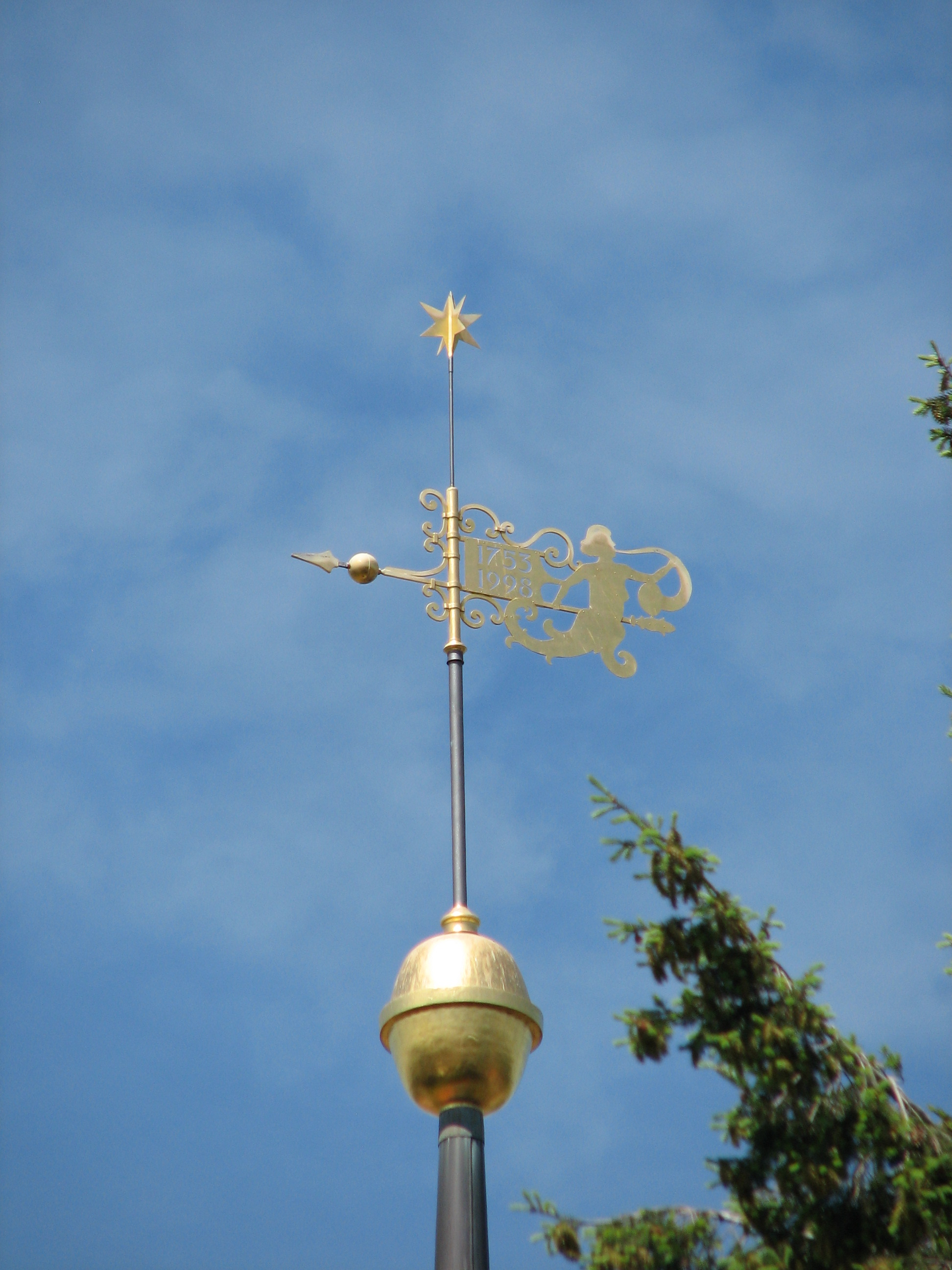 Turmknauf und Wetterfahne mit den Jahreszahlen 1753 und 1998